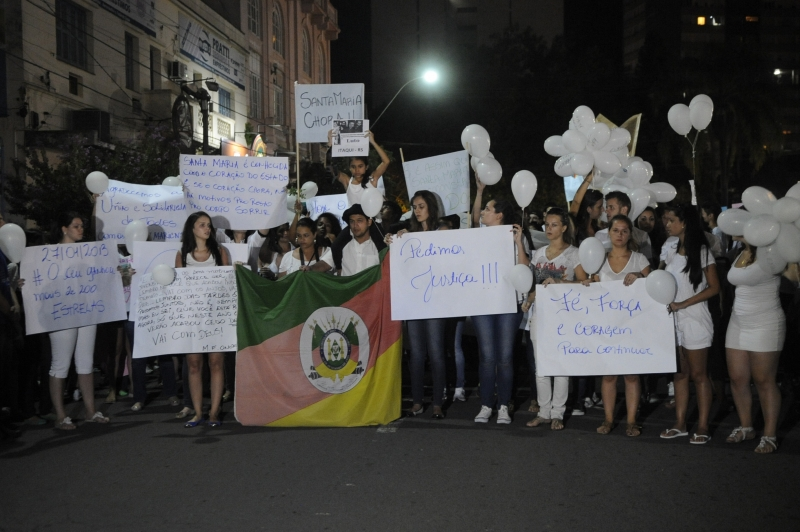 Milhares de pessoas fazem passeata em homenagem às 231 pessoas que morreram vítimas do incêndio na Boate Kiss.